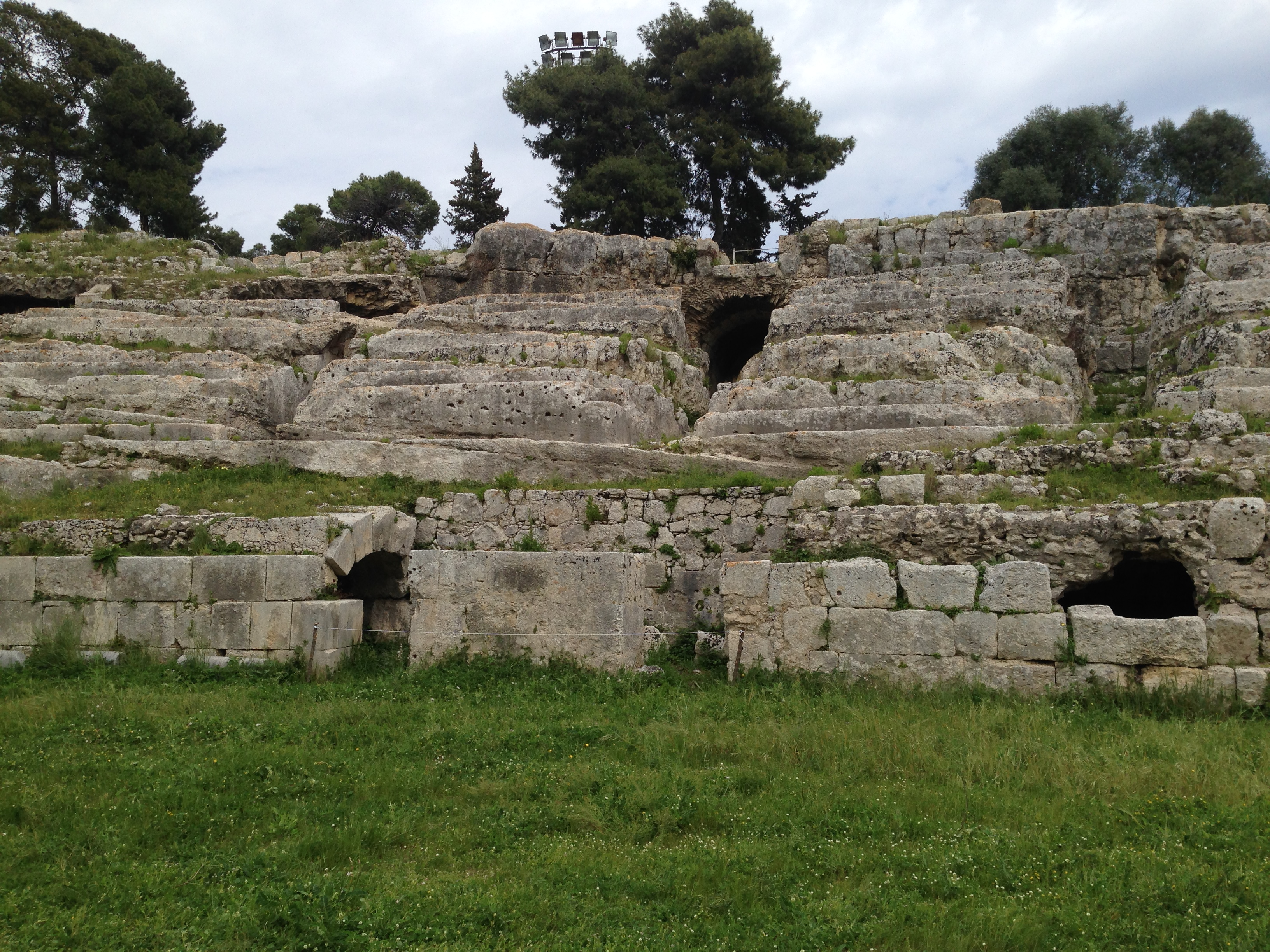 Vista dell'anfiteatro dall'interno